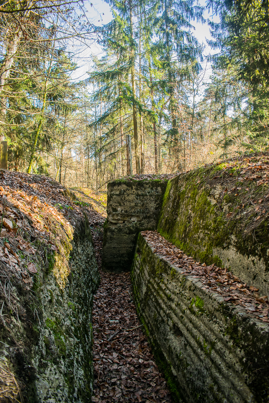 Restes de tranchées allemandes dans la commune de Saint-Baussant. Photo prise lors d'un séjour à Verdun.